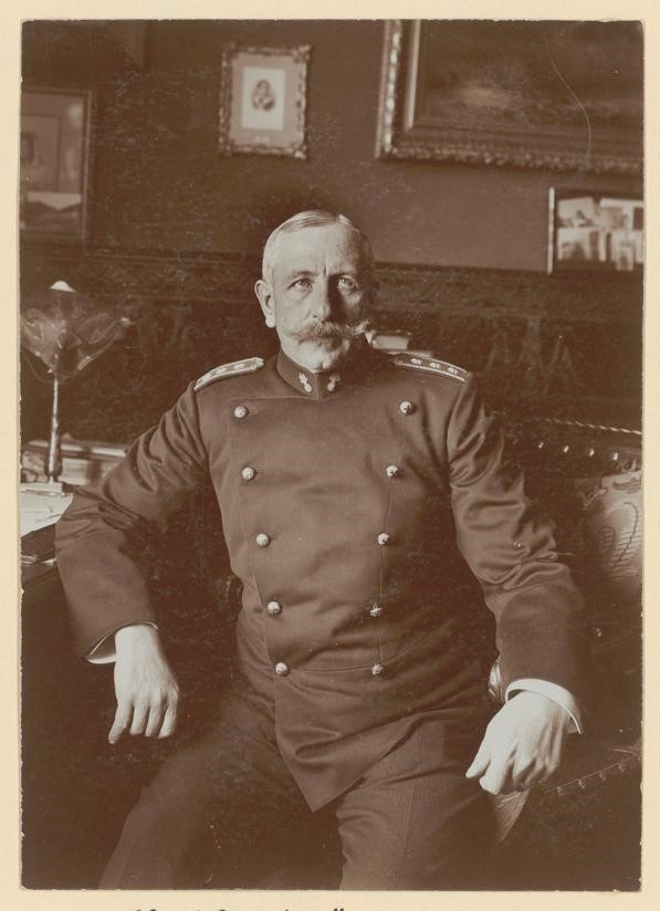 Oberst Armin Müller, Chef der marokkanischen Polizei 1907-1911, ca. 1910 (Zentralbibliothek Zürich